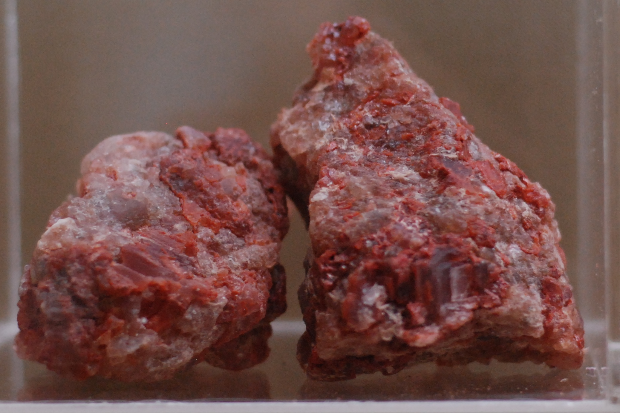 Silvita KCl. Carlsbad, Nuevo México, Estados Unidos.